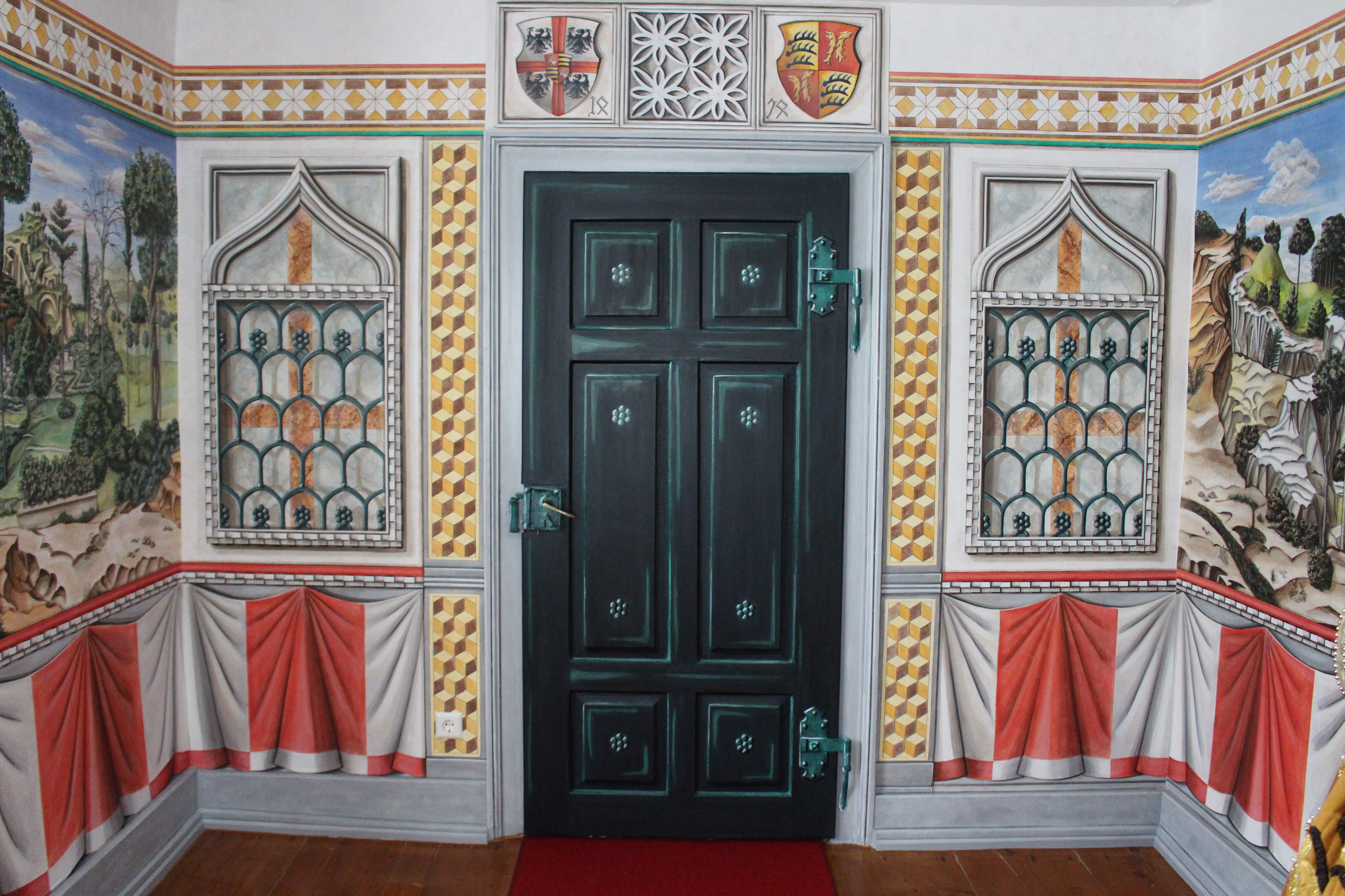 Die Wandmalerei im Gewandhaus Museum Inneringen wurde von Katja Morrison gefertigt. Urheberrecht bei Katja Morrison. Bilddatei von Katja Morrison. The murals in the Gewandhaus Museum Inneringen have been painted by Katja Morrison, copyright by Katja Morrison. Image by Katja Morrison